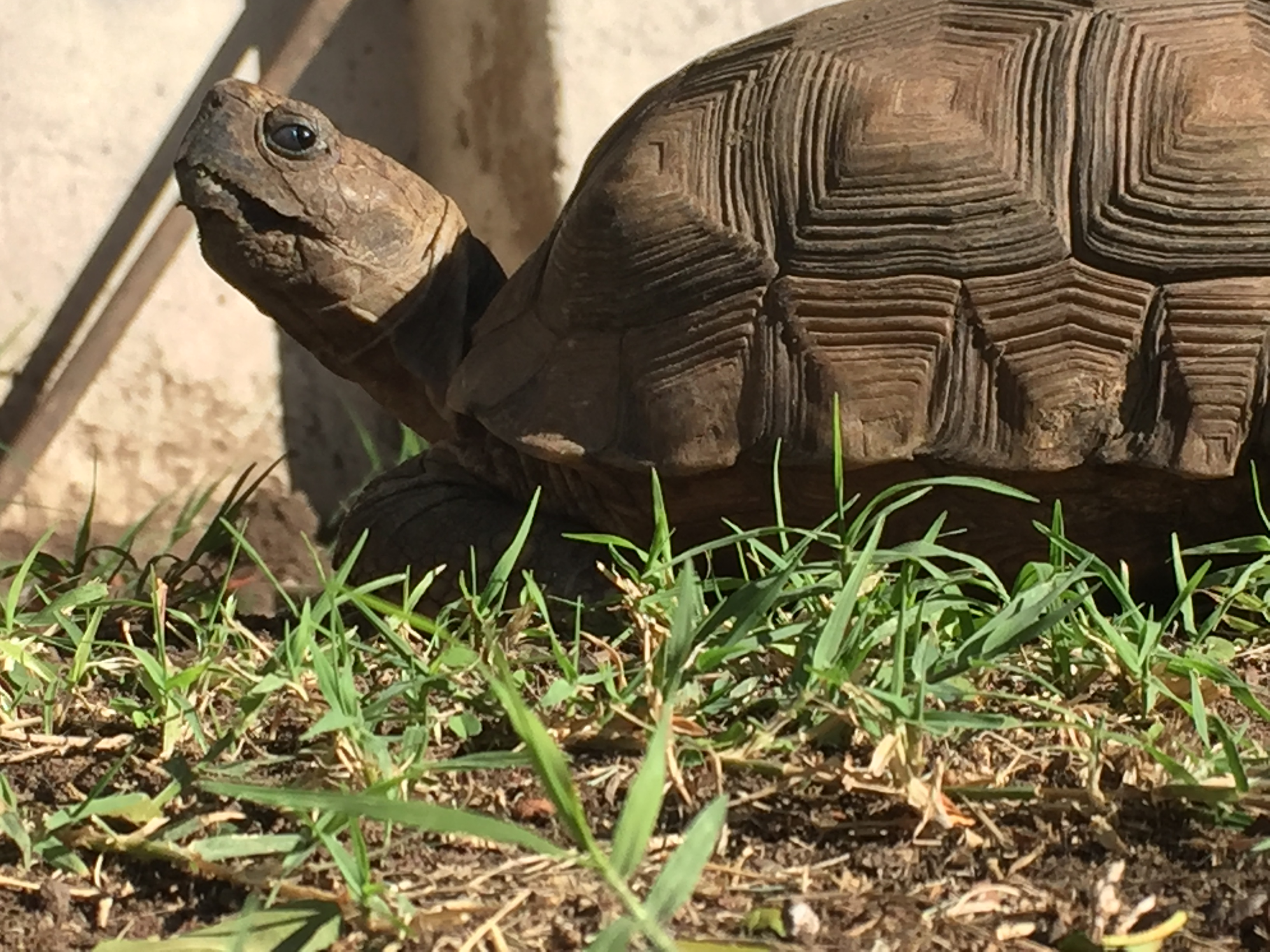 Ejemplar en cautiverio